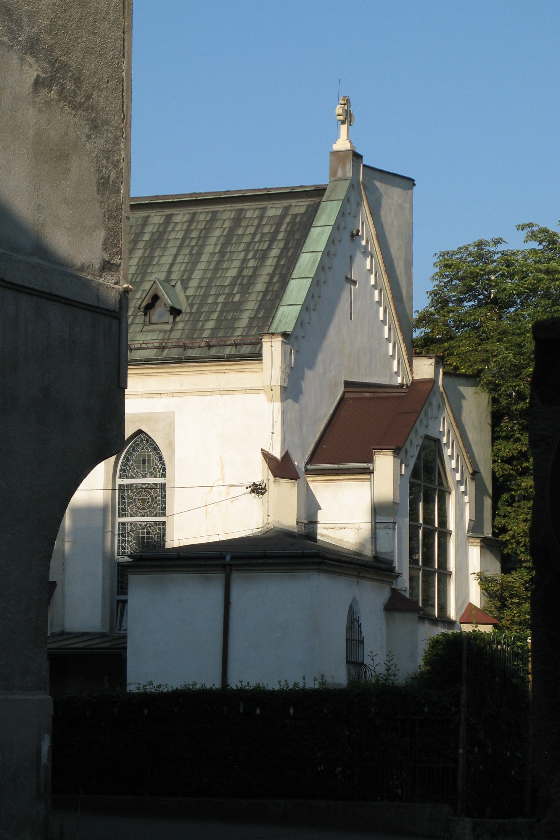 kaplica Zakładu Opiekuńczo-Leczniczego sióstr Boromeuszek w Bytomiu, ul. Krakowska 30